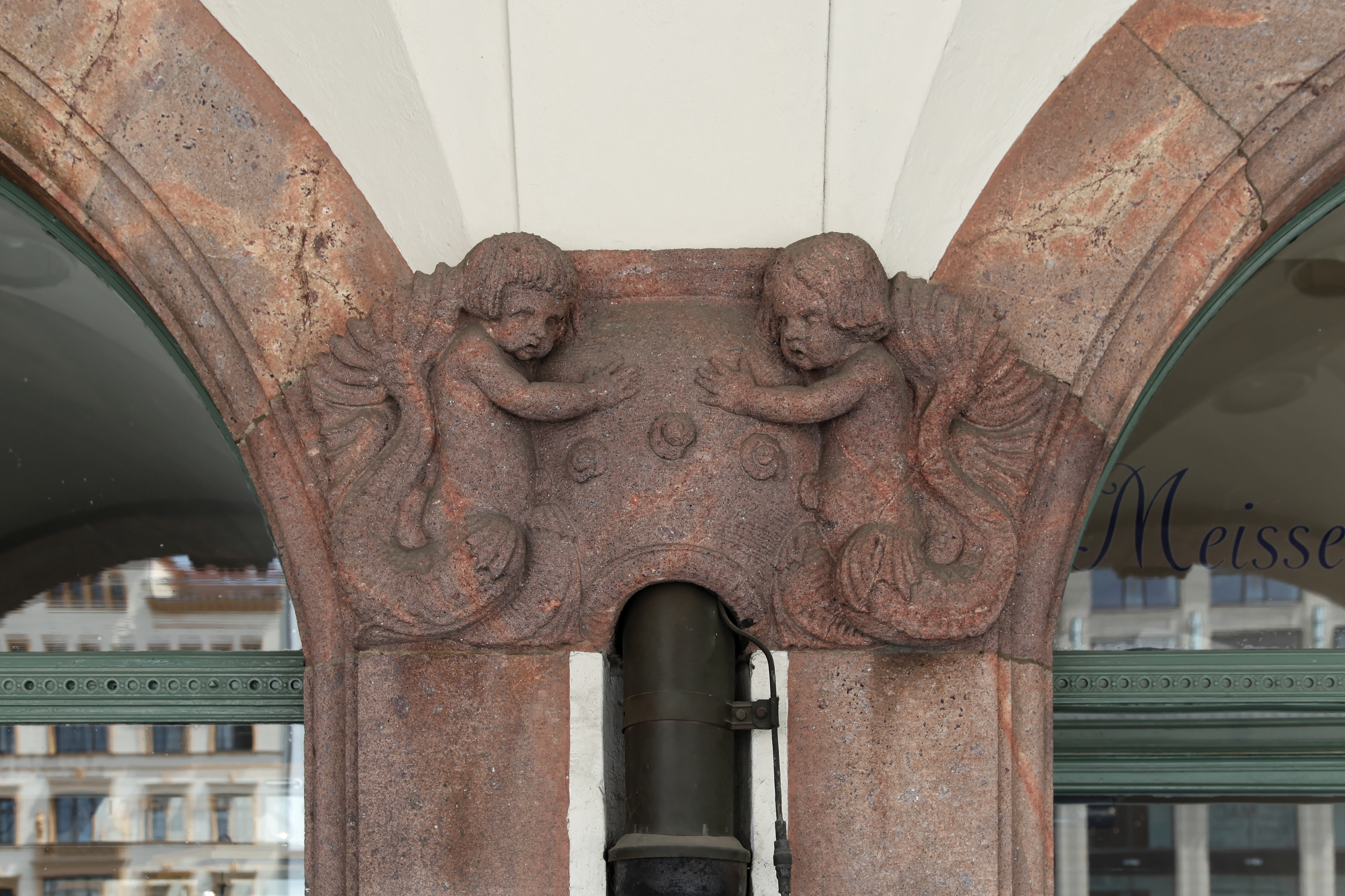 Altes Rathaus, Markt 1 in Leipzig